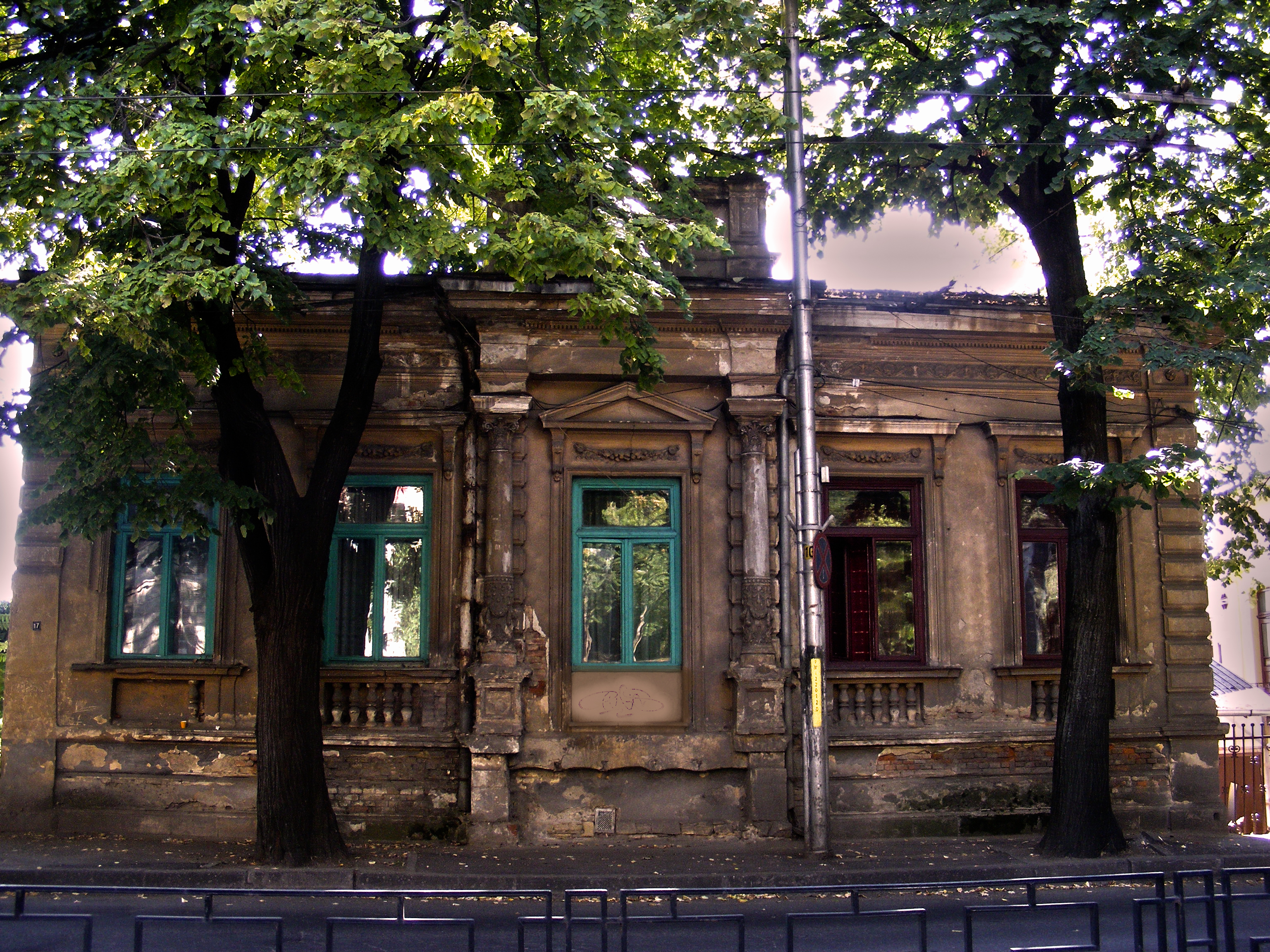 Casa Gheorghe Racoviță